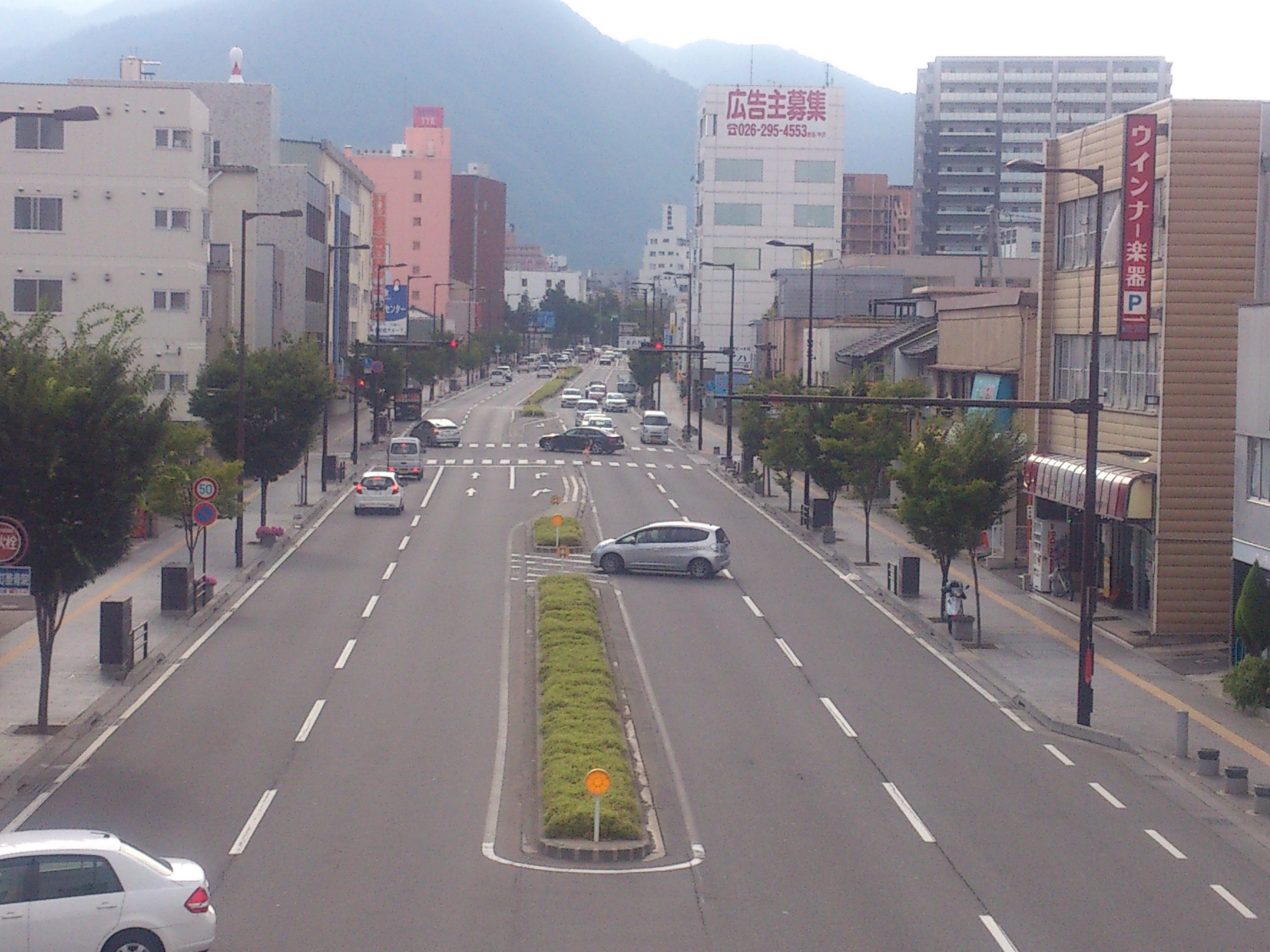 柳町通り・善光寺方面（長野県長野市柳町）